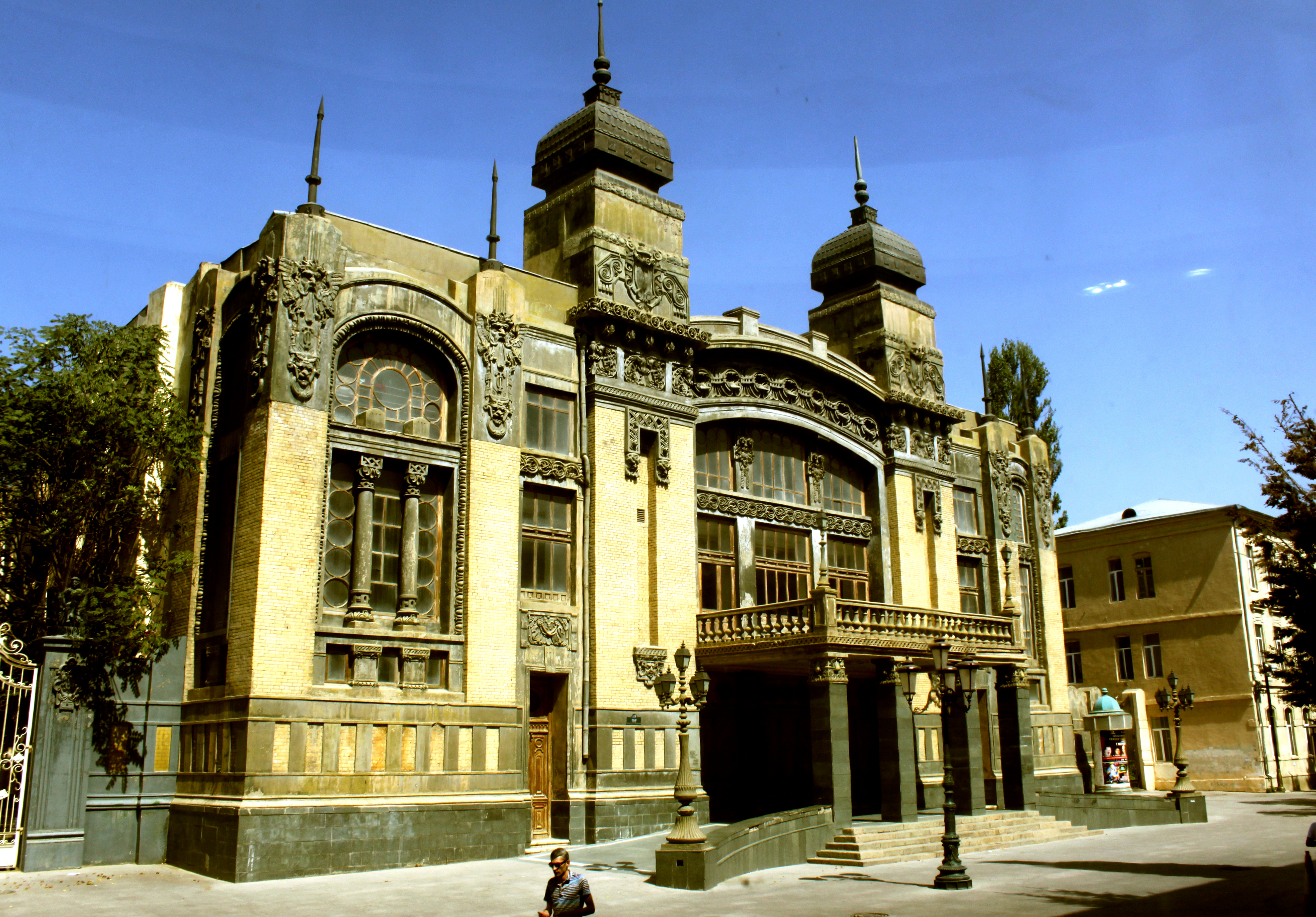 Azərbaycan Dövlət Akademik Opera və Balet Teatrının binası